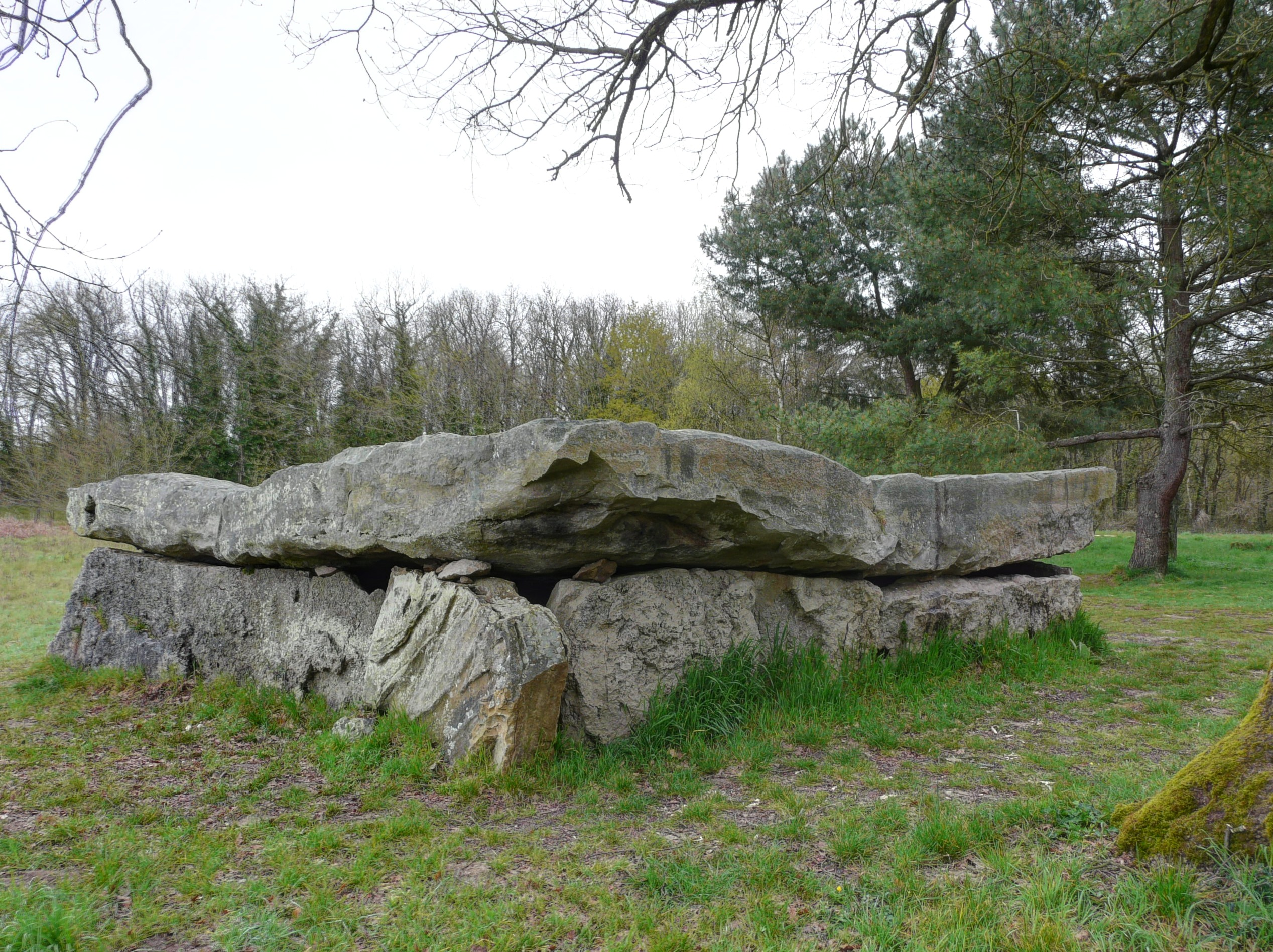 Dolmen de La Bajoulière, vue de l'arrière